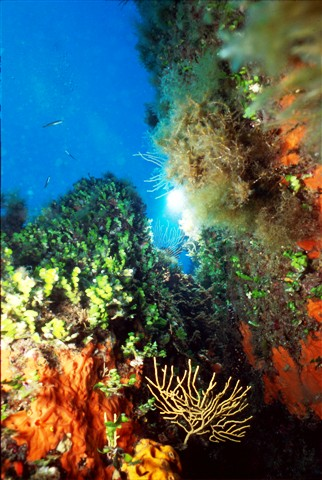 Finistruna, Area Marina Protetta Capo Gallo, Palermo, Sicily Halimeda tuna (middle-left) and Eunicella cavolinii (bottom-right)